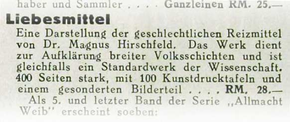 Zeitschriftenwerbung für Magnus Hirschfelds Standardwerk zur Sexualkunde, 1930